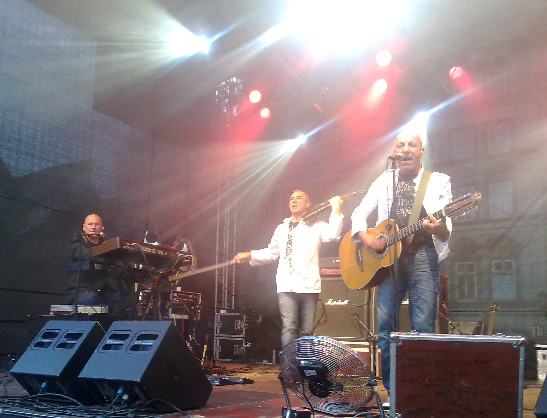 CITY auf dem Markt am 20.05.2011